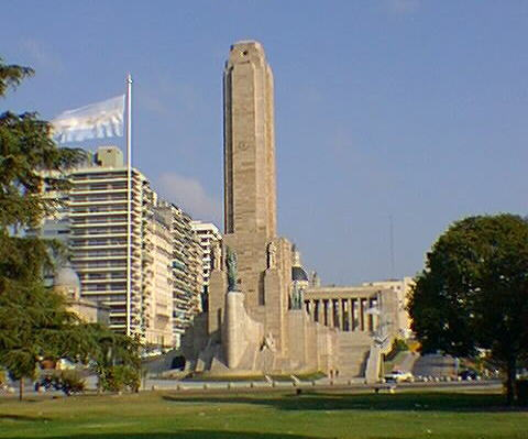 Una vista frontal del Monumento Nacional a la Bandera, en el Parque Nacional a la Bandera de la ciudad de Rosario, Argentina. Esta imagen es propiedad de .ar (su uso es libre con un mensaje de propiedad como este).